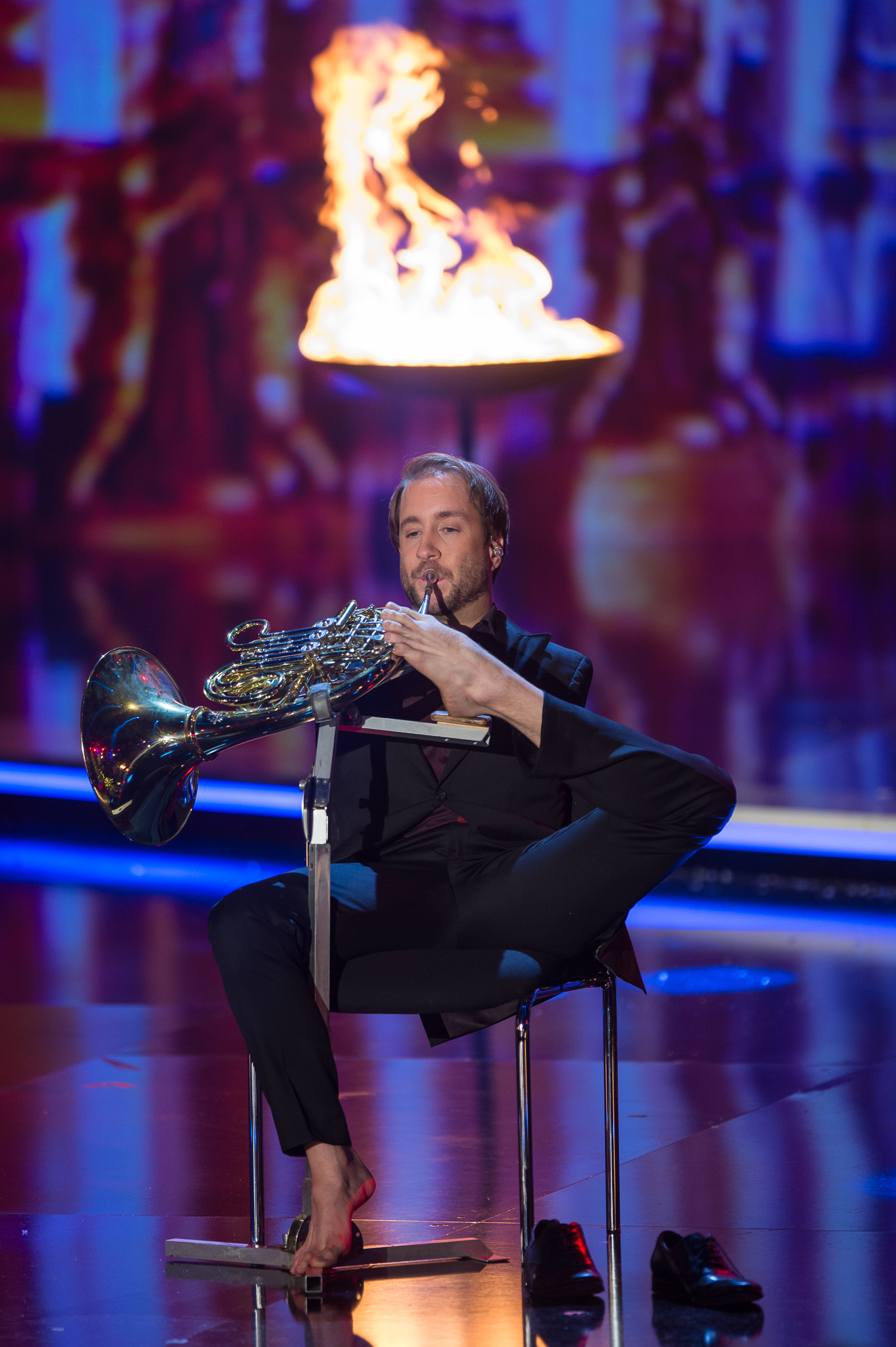 BR,Bayerisches Fernsehen,Felix Klieser,Frankenhalle,Live-Sendung,Sternstunden-Gala,Sternstundengala